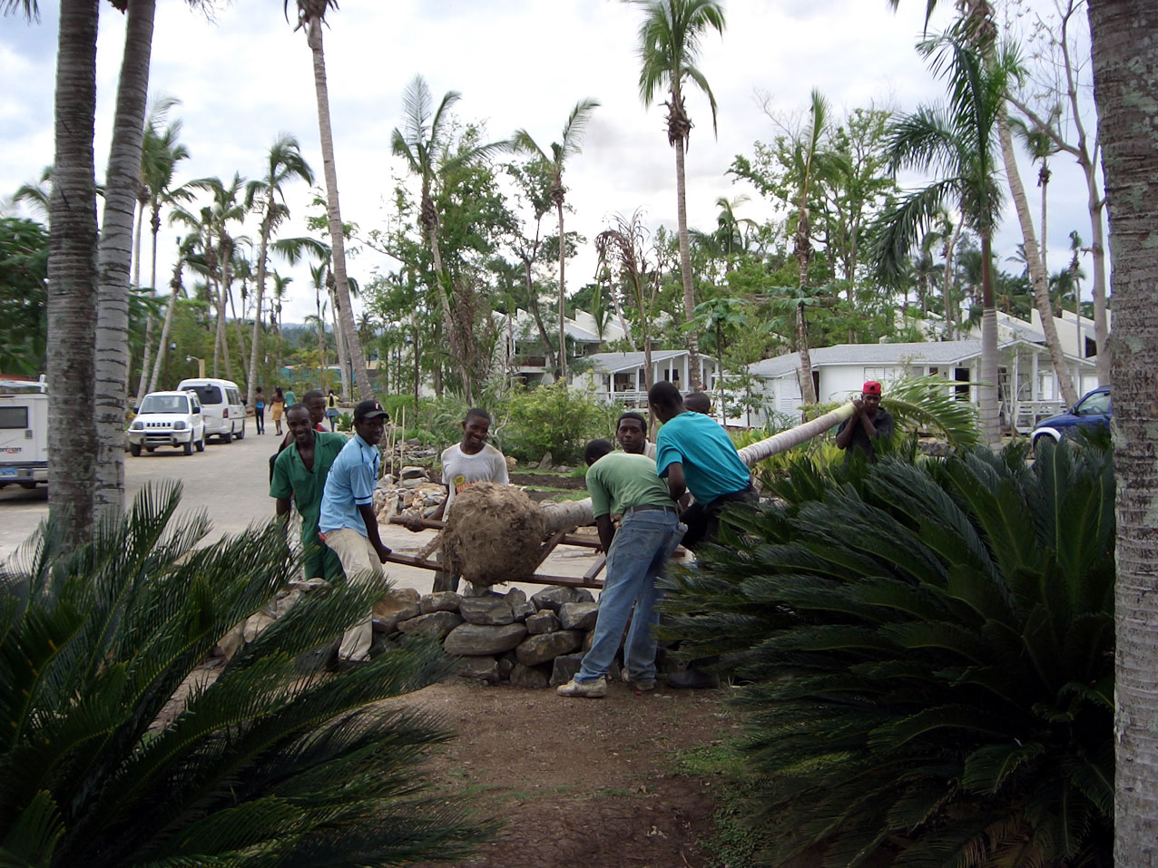 Dominikaniche Republik: Pflanzen einer Palme